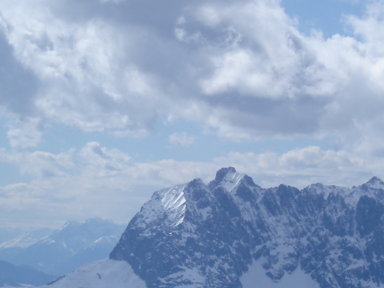 Maukspitze, Kaisergebirge, view from Waidring